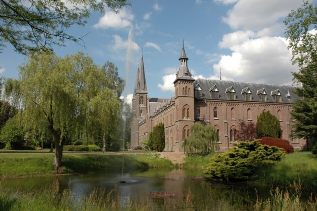 (C) Hans Lenting ( 2005